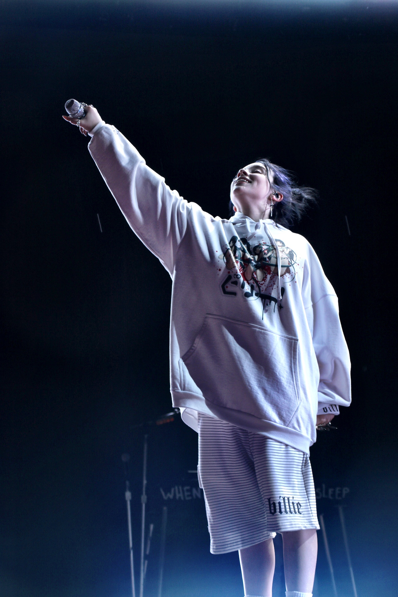 Billie Eilish ::: Red Rocks::: 06.05.19